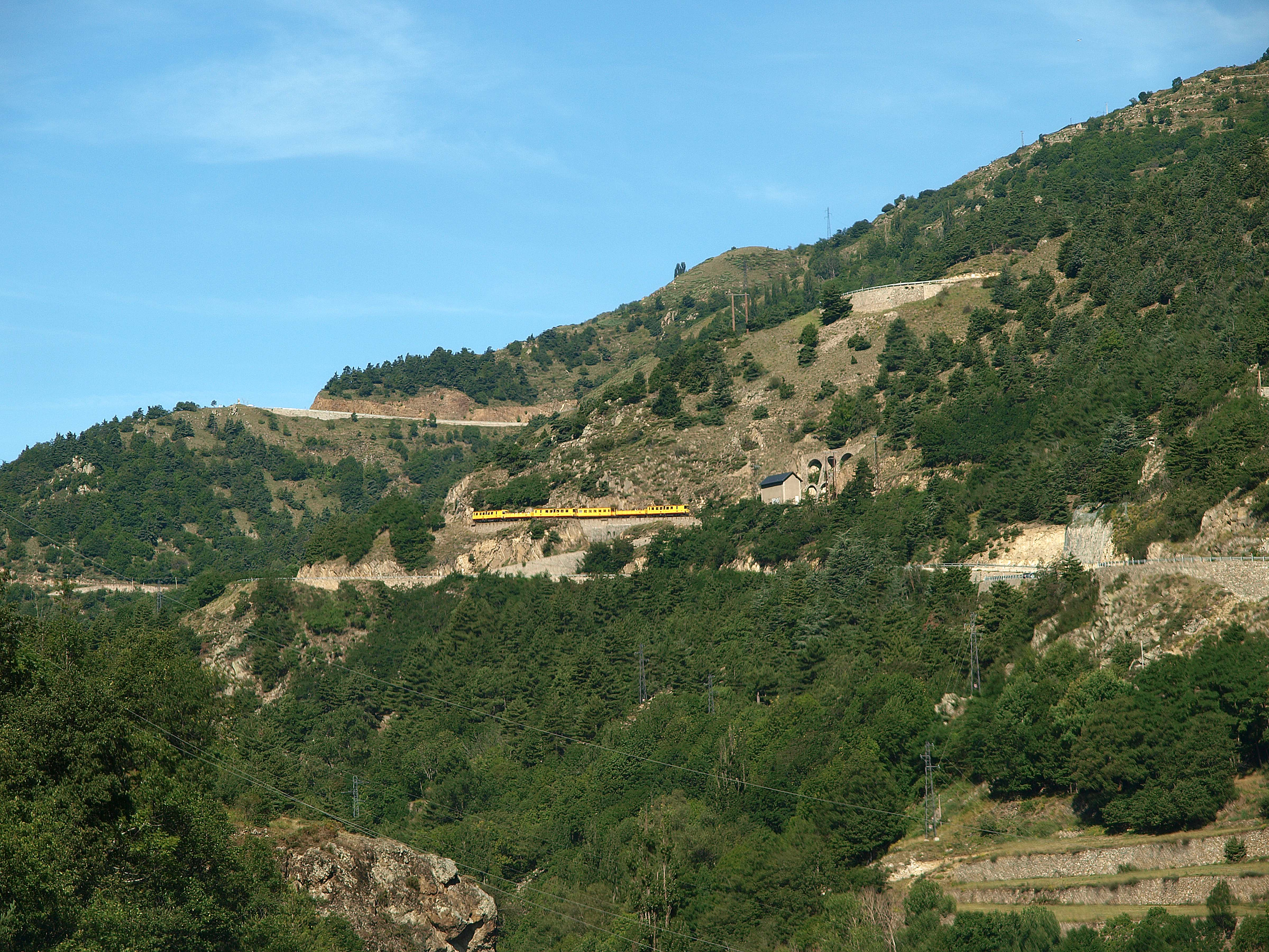 Ligne de Cerdagne - Train quittant la gare de Sauto